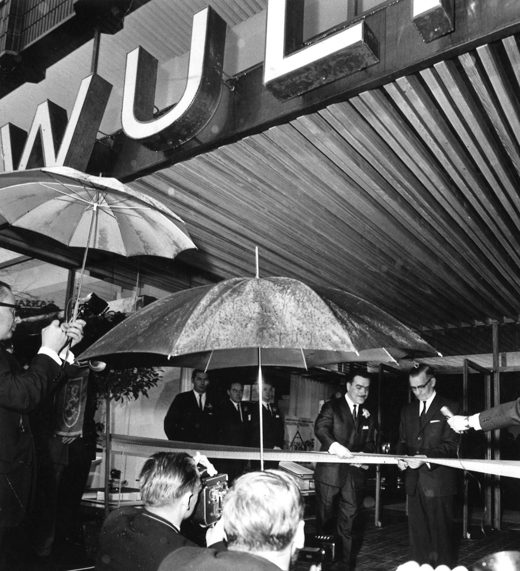 Oy Wulff Ab:n uuden toimitalon avajaiset. Nauhaa leikkaamassa Harry Fr. Wulff (vas.) ja ylipormestari Lauri Aho.